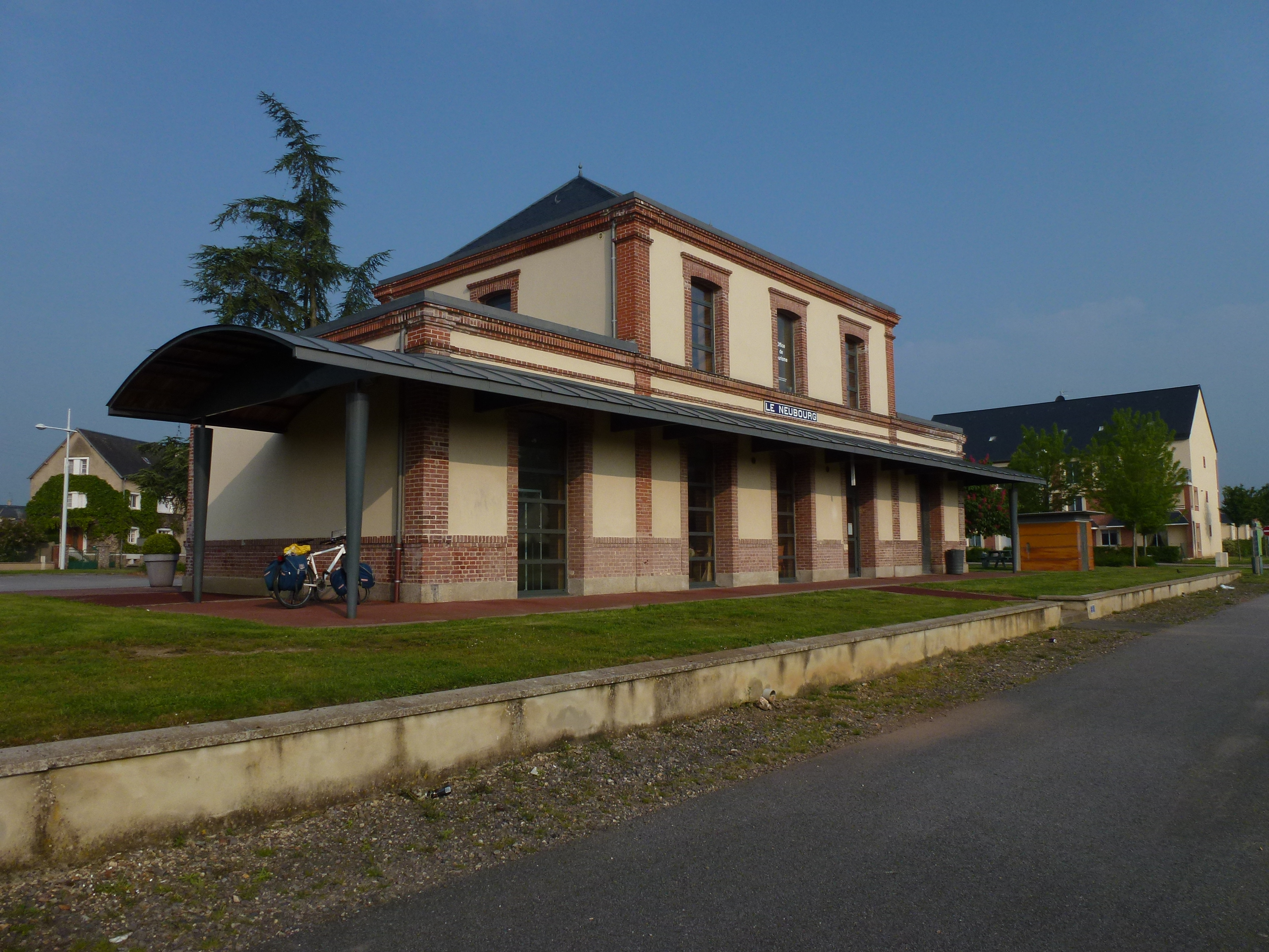 Voie verte Évreux-Vallée du Bec 08, ancienne gare, actuellement Office du tourisme, Le Neubourg